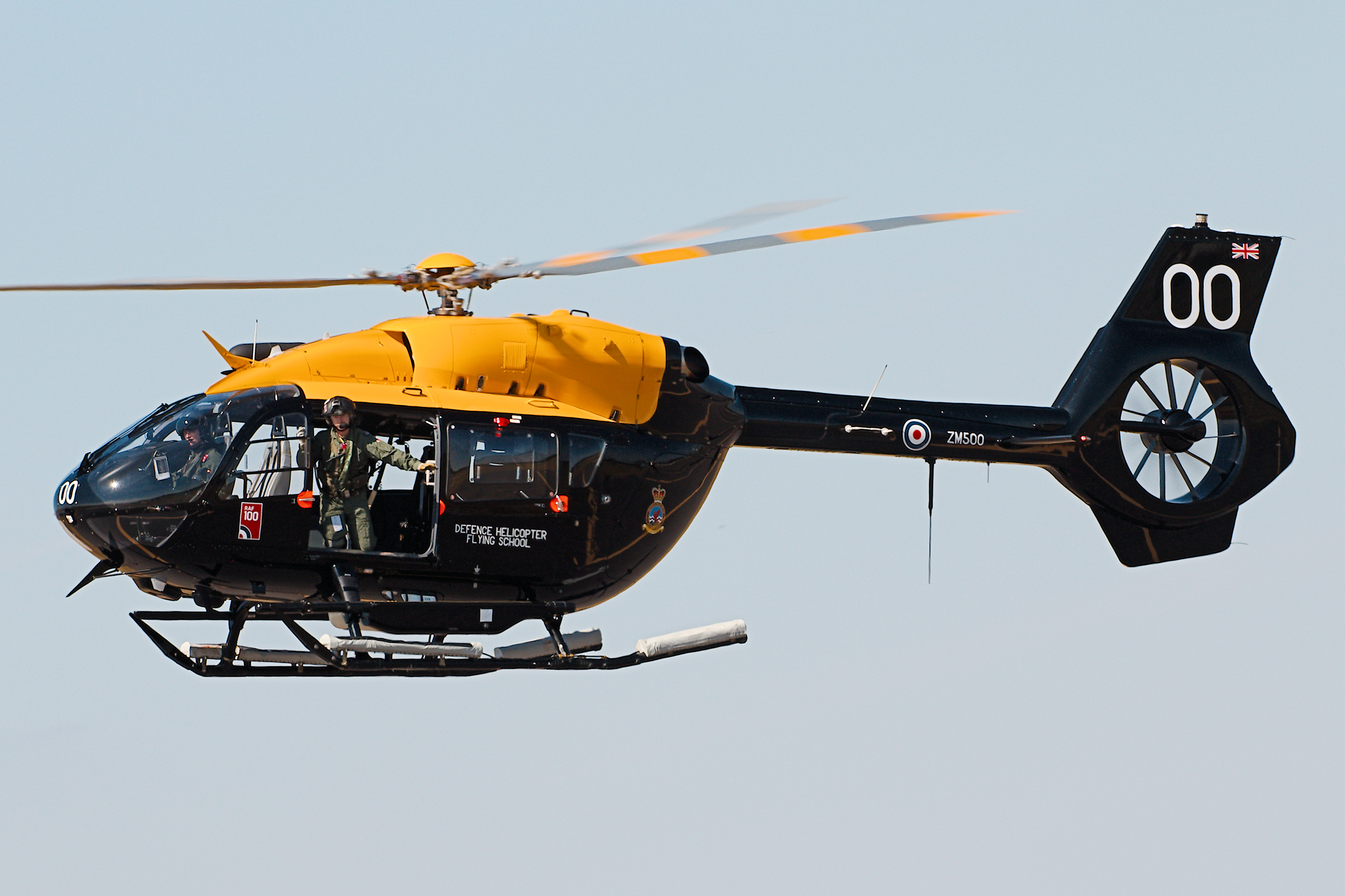 H-145 Jupiter - RIAT 2018